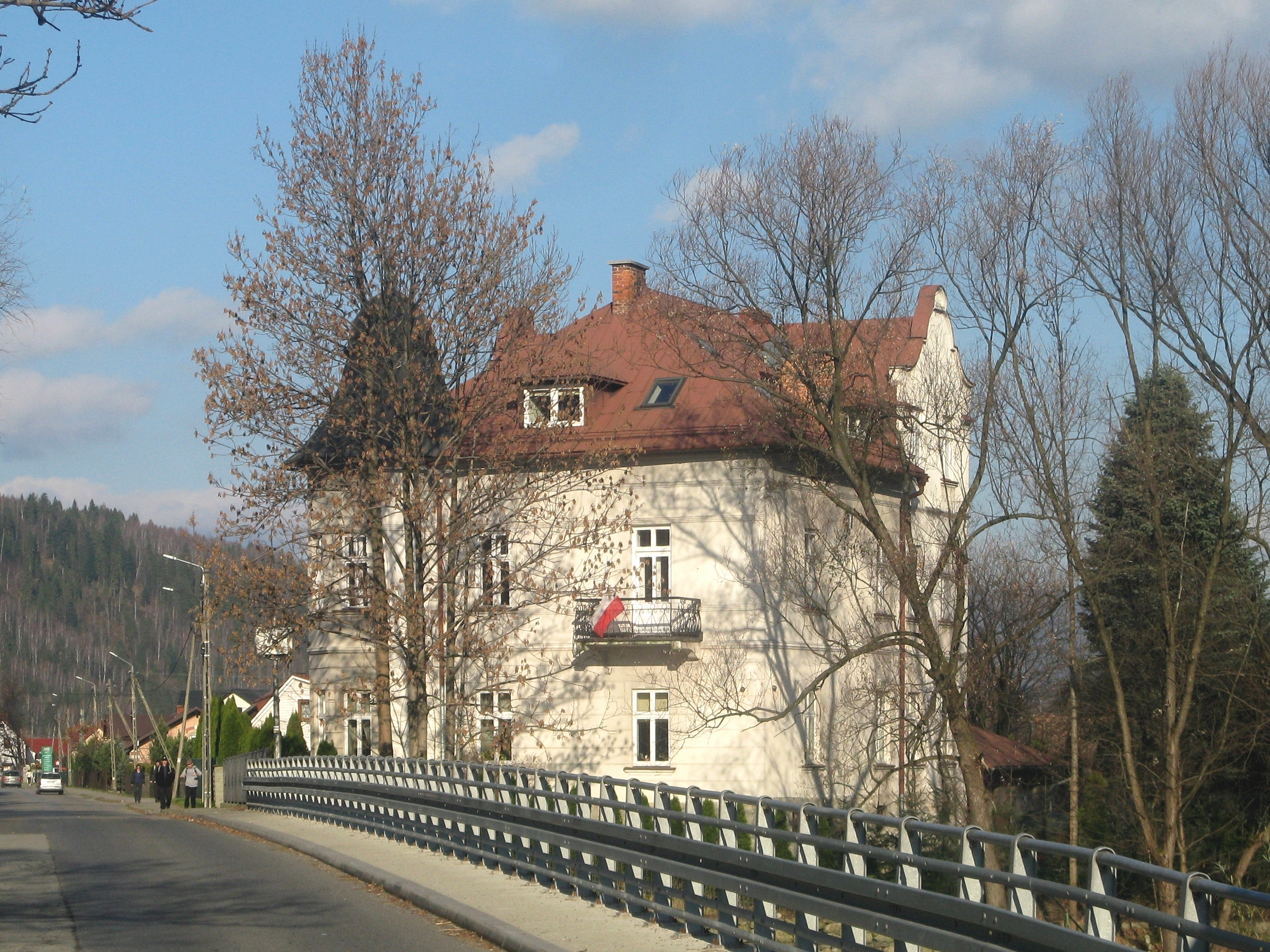 Dom w Rajczy pod numerem 227, nad Sołą, tzw. dom Kornhauserów.